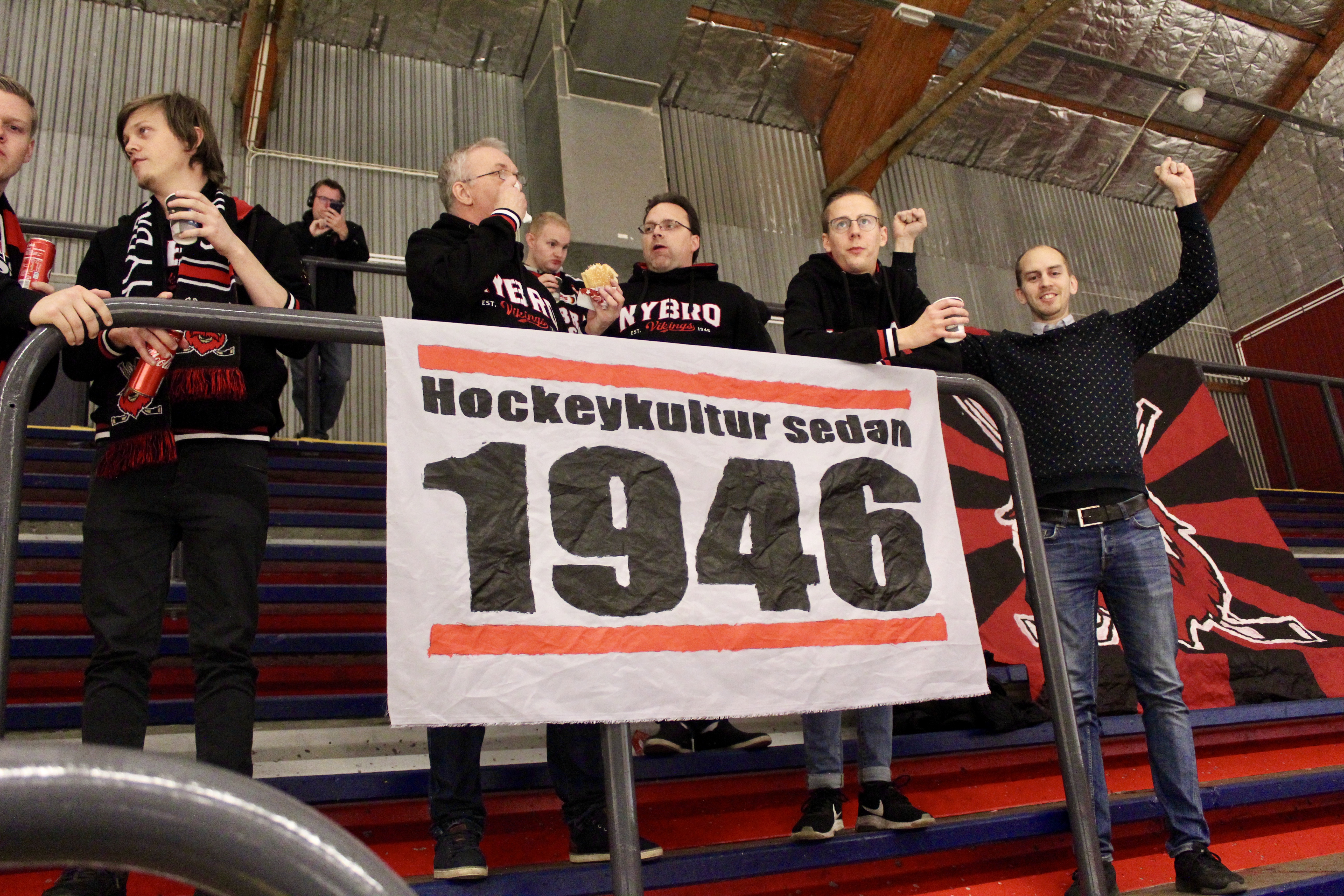 Viking support i Borås Arena på match mellan Borås HC–Nybro Vikings 6 November 2019.